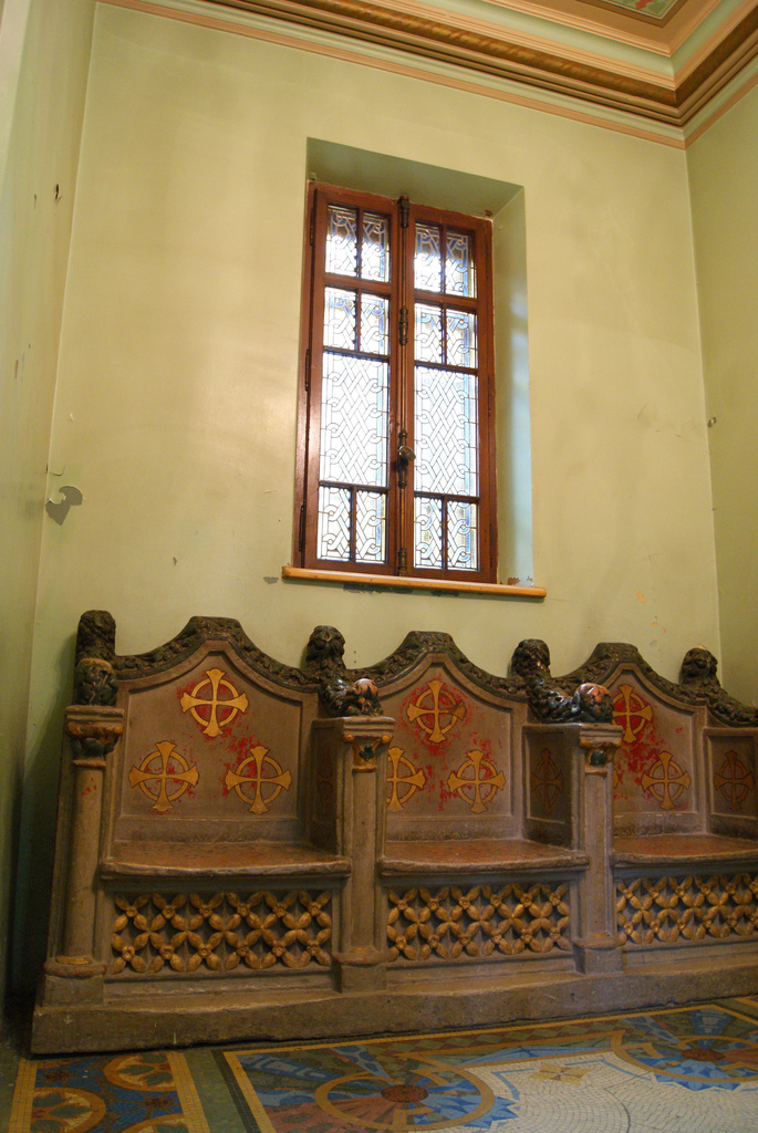 Castelul Cantacuzino